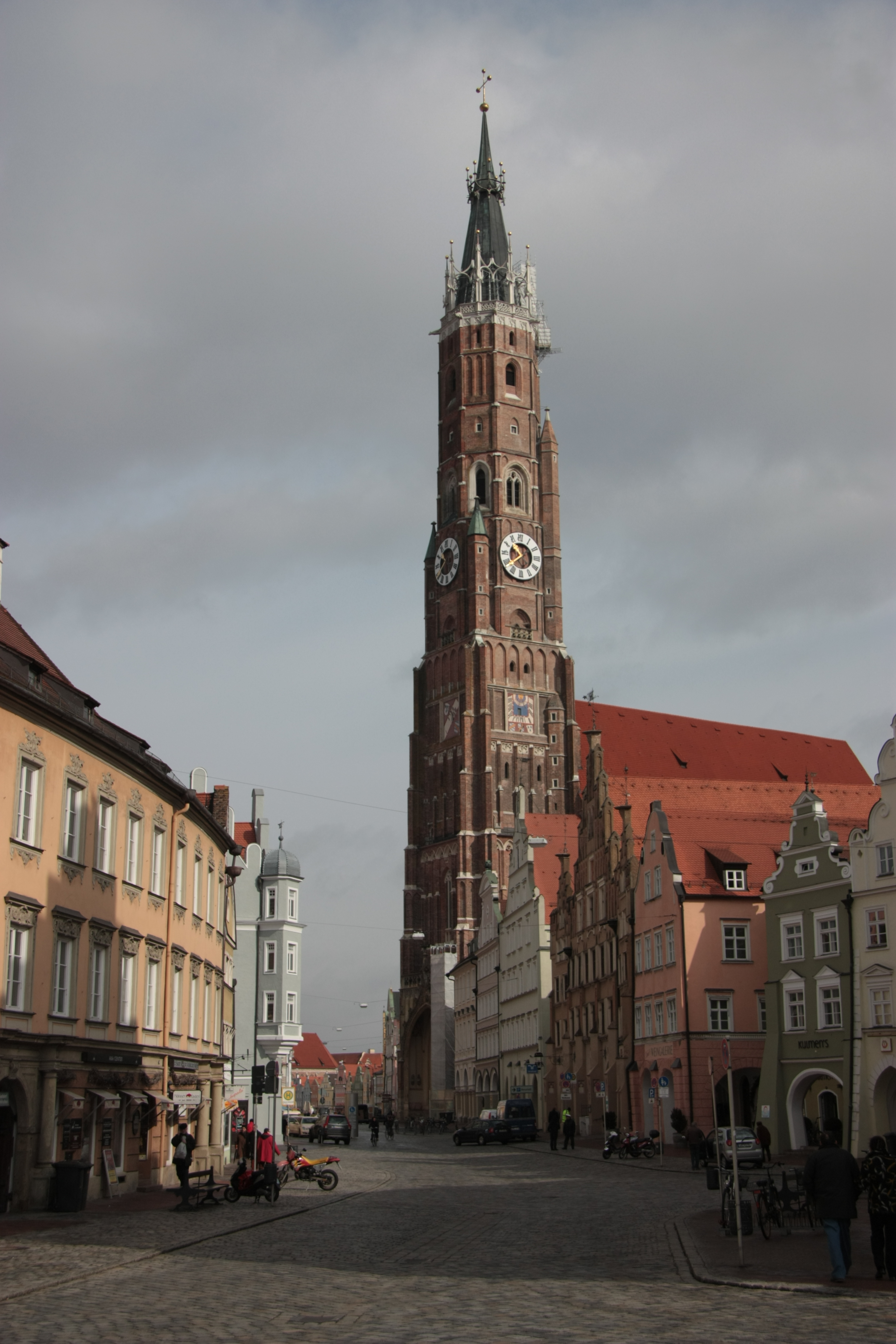 Martinskirche in Landshut mit Blick auf die Innenstadt